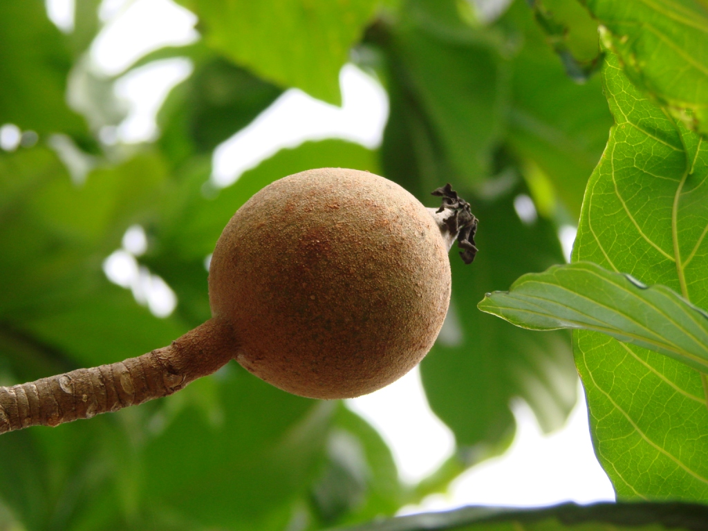 Genipa americana - RUBIACEAE Parque da Cidade - Brasília - Distrito Federal - Brasil.